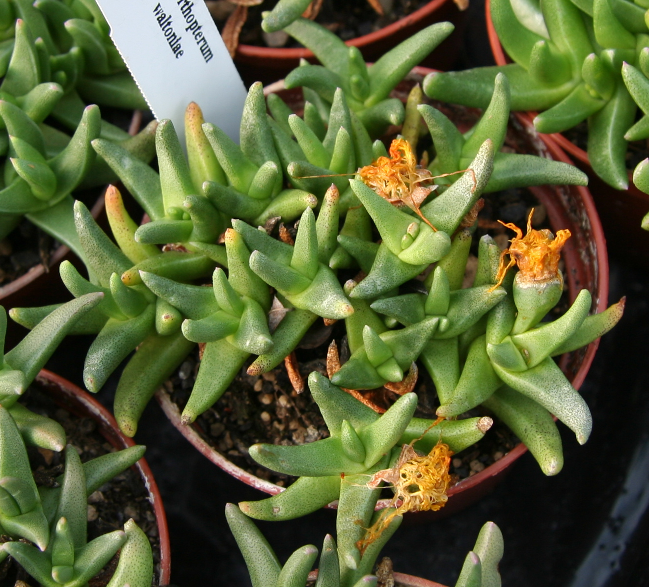 Orthopterum waltoniae in Kultur bei Kakteen-Haage in Erfurt